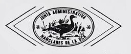 Escudo de la Junta Administrativa de Nanclares (Álava)